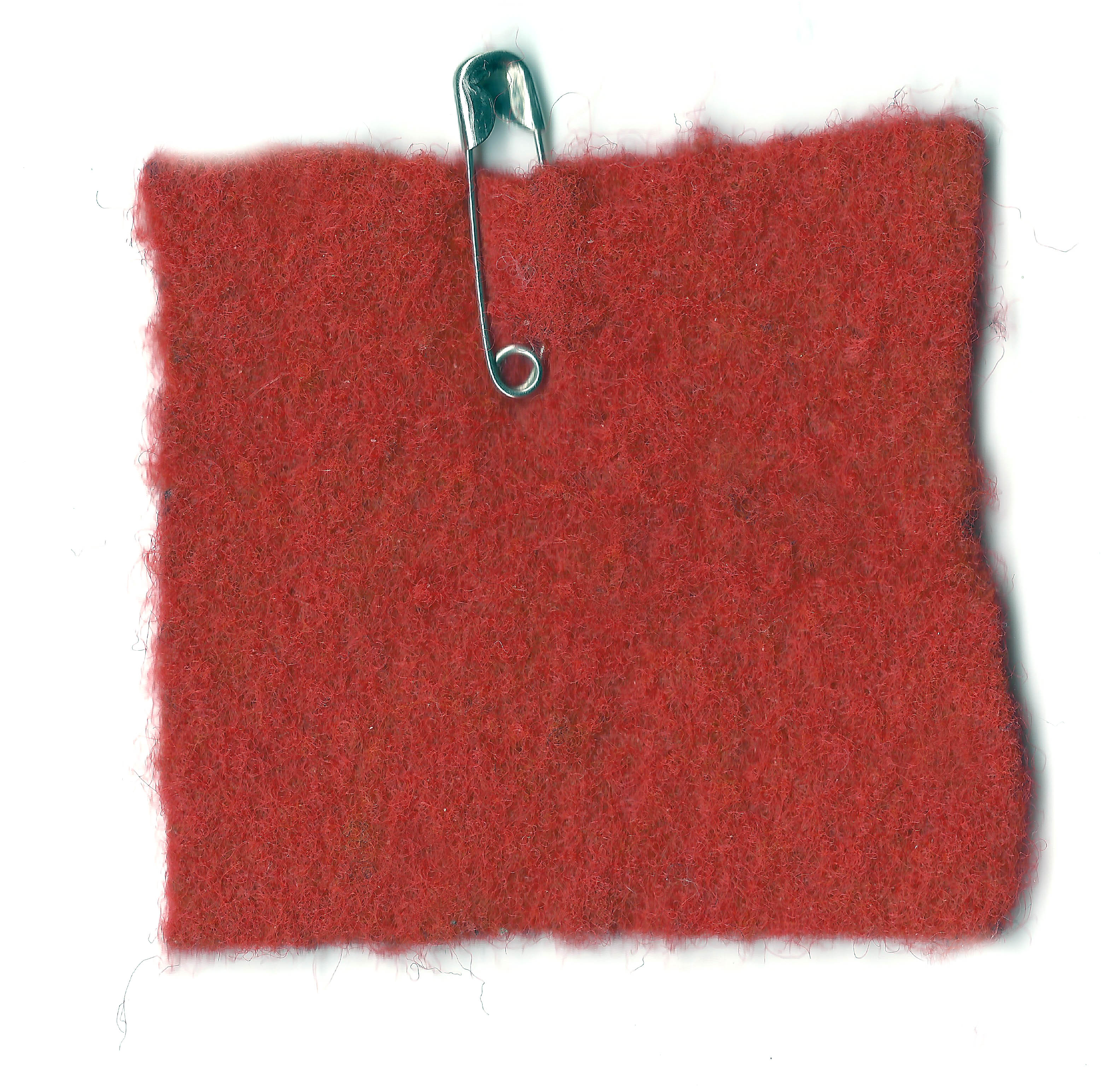 Carré rouge en feutre distribué par les étudiants en grève de l'Université de Montréal